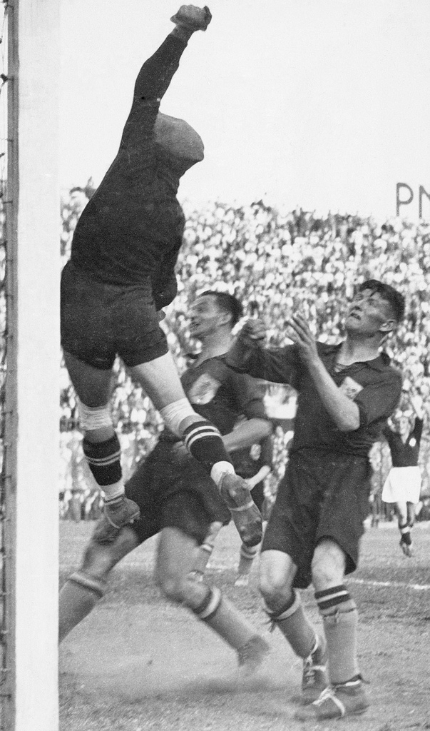 De Zwitserse doelman Sechehaye komt in actie voordat Beb Bakhuys (midden) en Kick Smit gevaarlijk kunnen worden. Nederland - Zwitserland (2-3), gespeeld op 27 mei 1934 in het San Siro-stadion in Milaan tijdens de Wereldkampioenschappen in Italië.